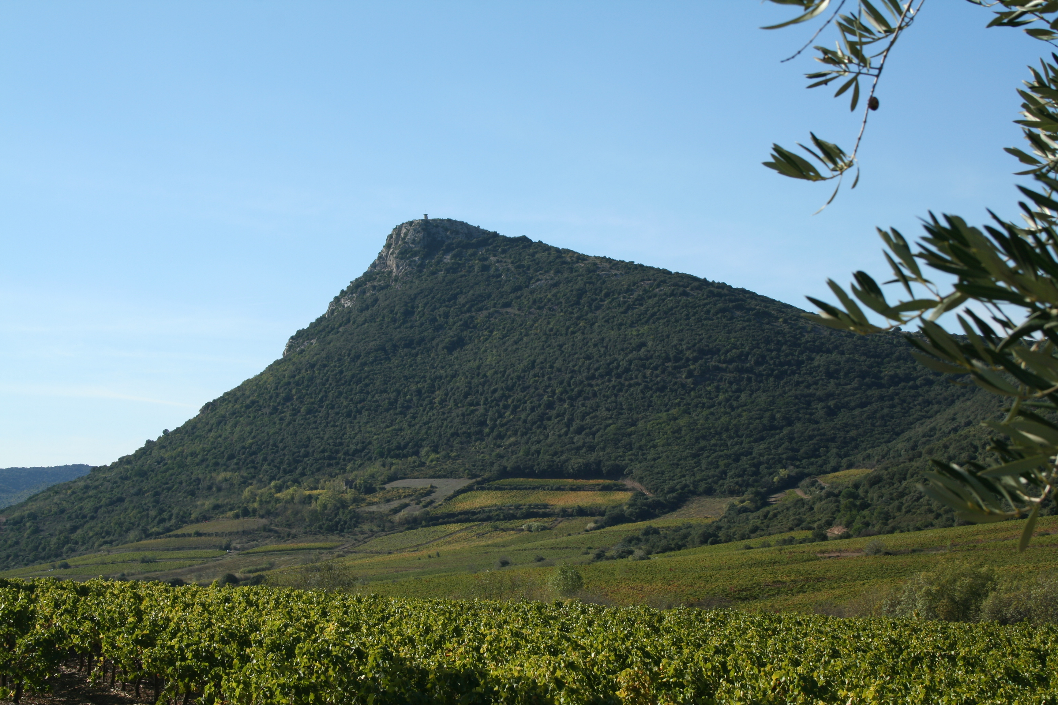 Cabrières (Hérault) - Pic de Vissou (480 m).